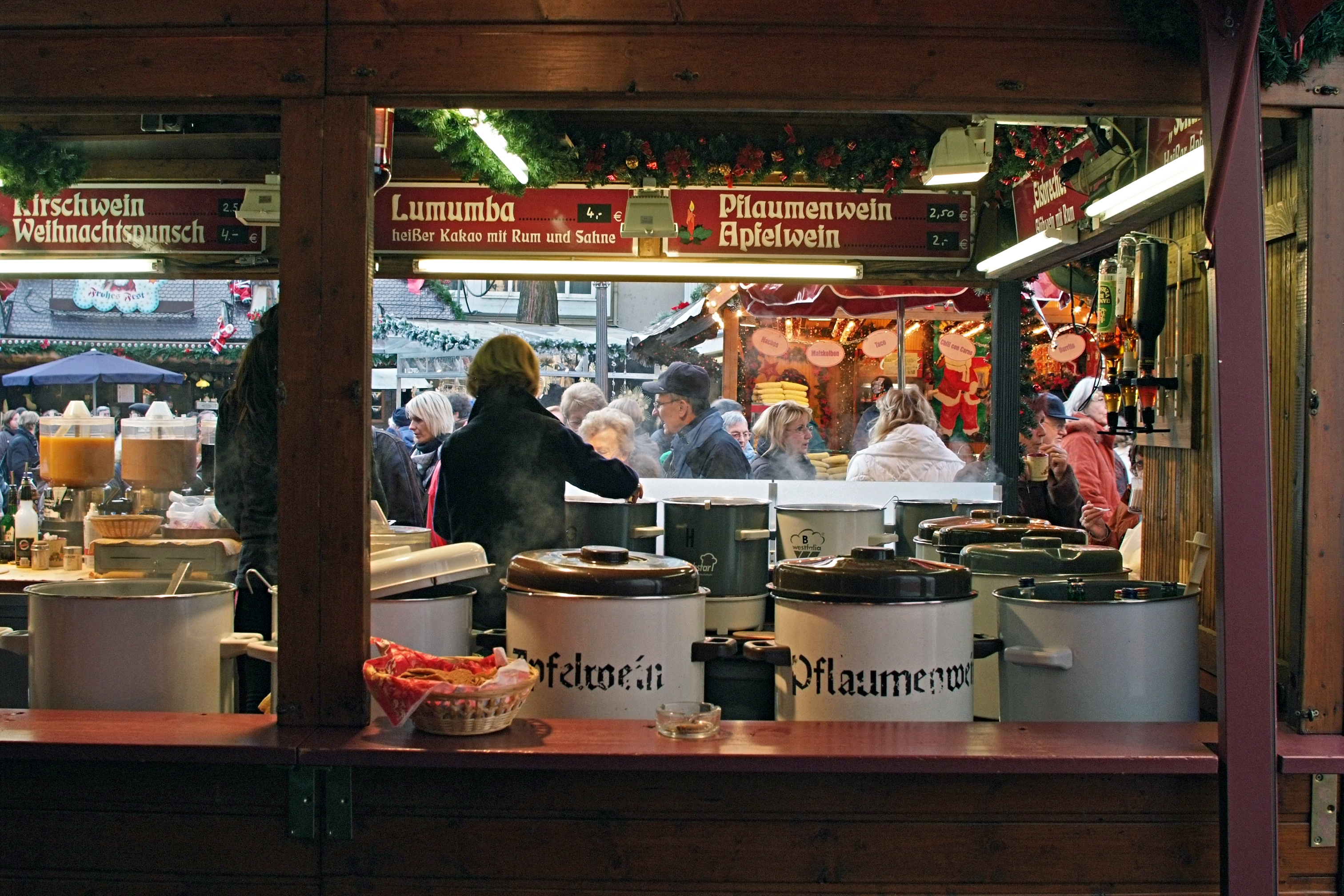 Weihnachtspunsch auf dem Frankfurter Weihnachtsmarkt